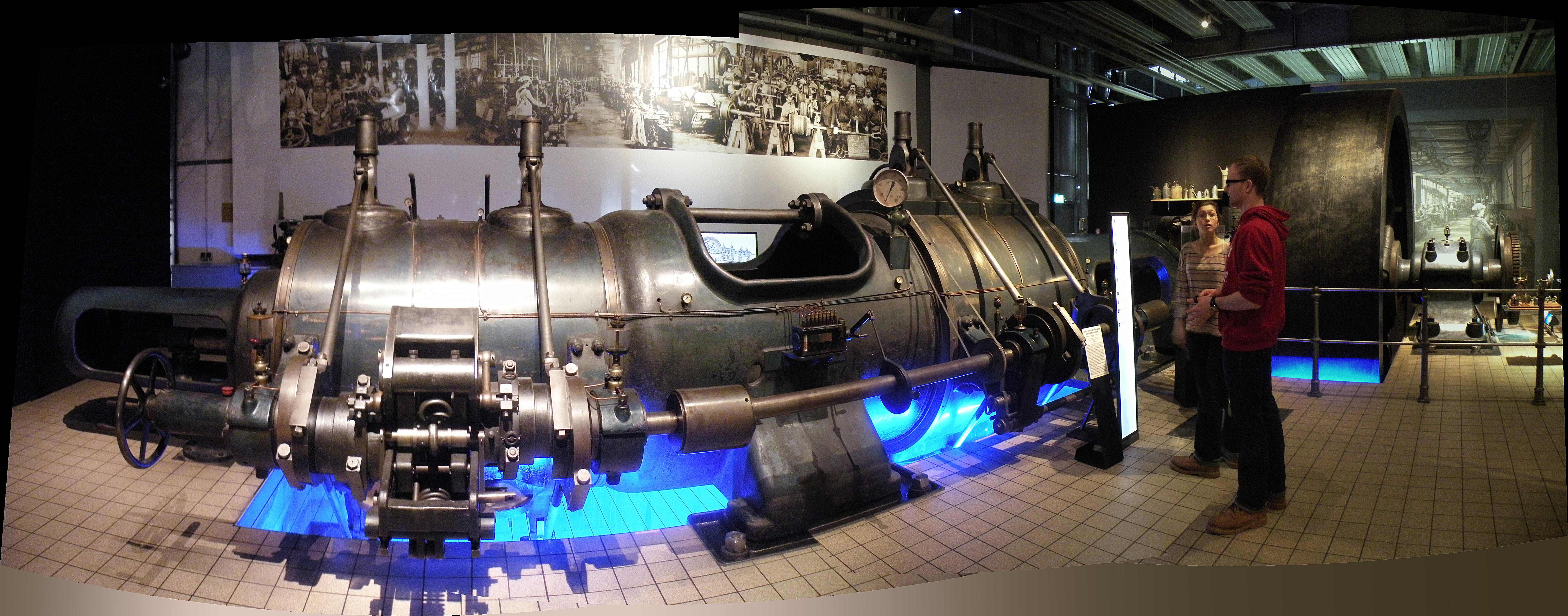 Двухцилиндровая паровая машина.Экспонат Музея Индустриальной Культуры.Нюрнберг.